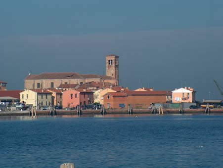 Kirche San Domenico in Chioggia Sonstiges: Sicht von der inneren Lagune zwischen Chioggia und Sottomarina